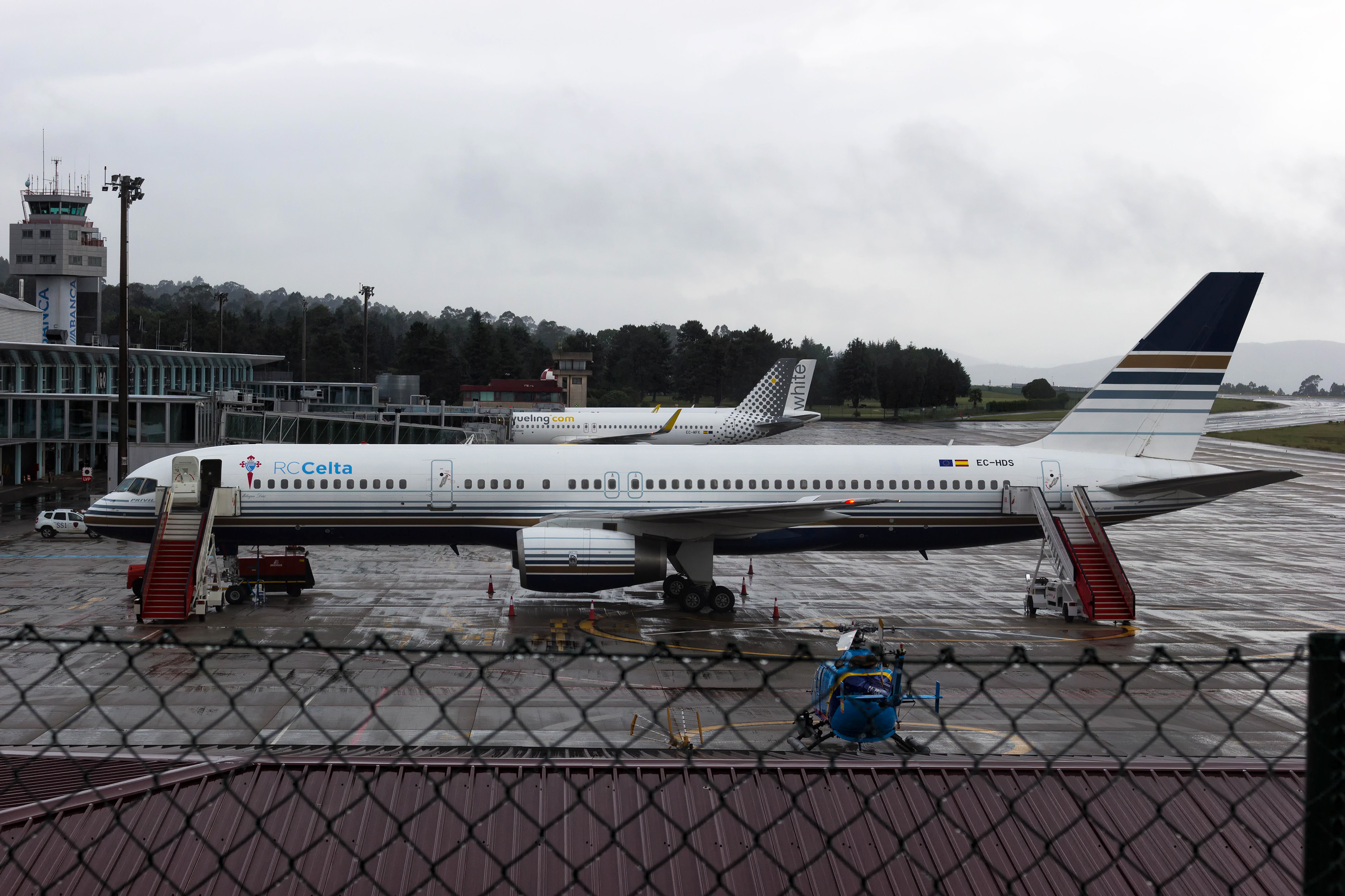 Boeing 757 de Privilege Style encargado de levar ao Celta de Vigo a Manchester no aeroporto de Vigo.